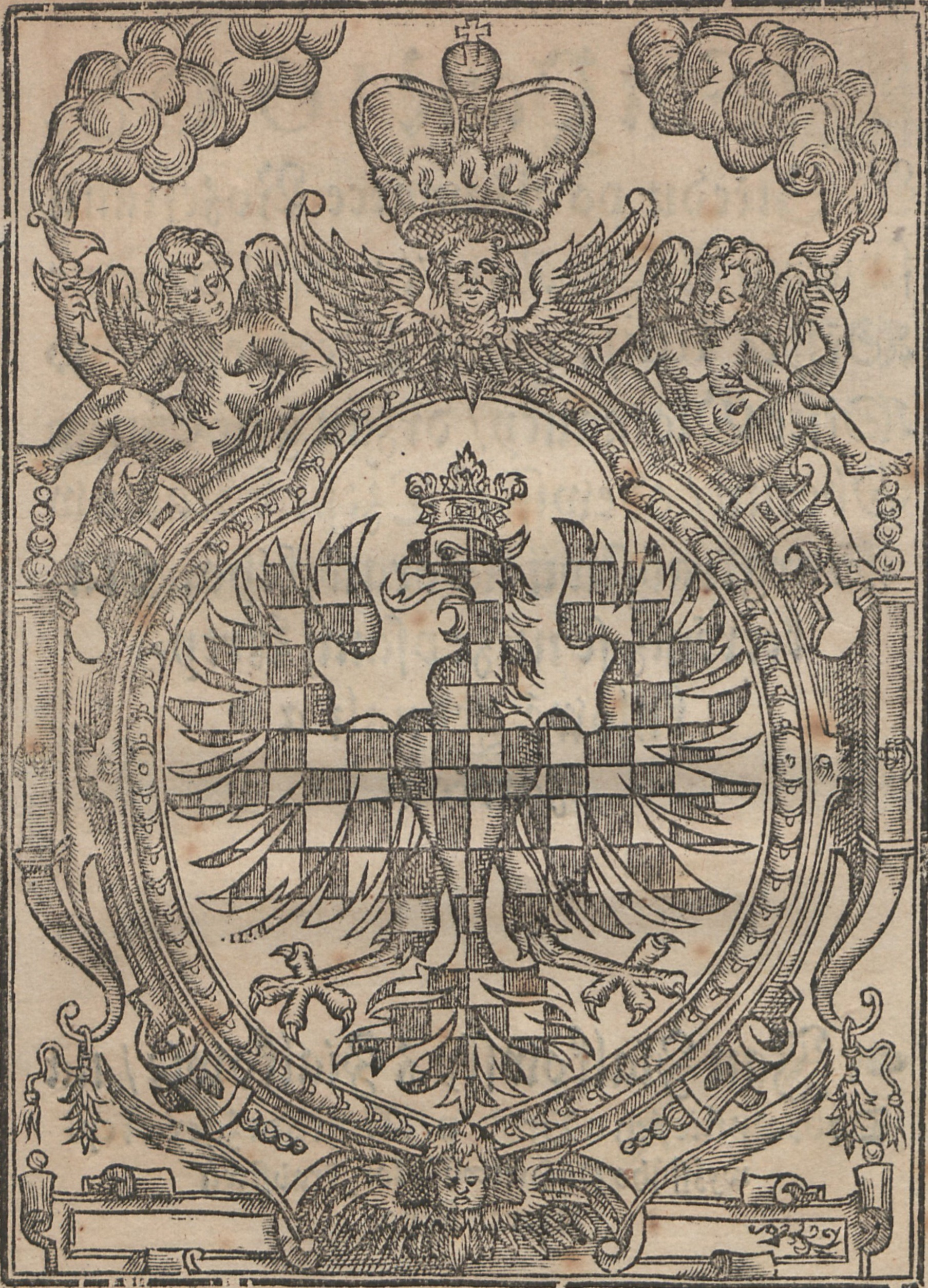 MZA v Brně, A 6 Sněmovní tisky, karton č. 1, znak Moravy ve sněmovní závěrce moravského zemského sněmu roku 1608